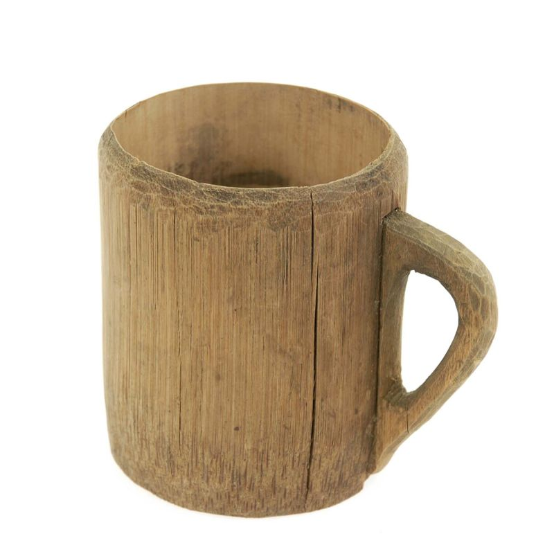 Beker. Bamboe drinkbeker voor mannen Unknown language: Irusan Pattung